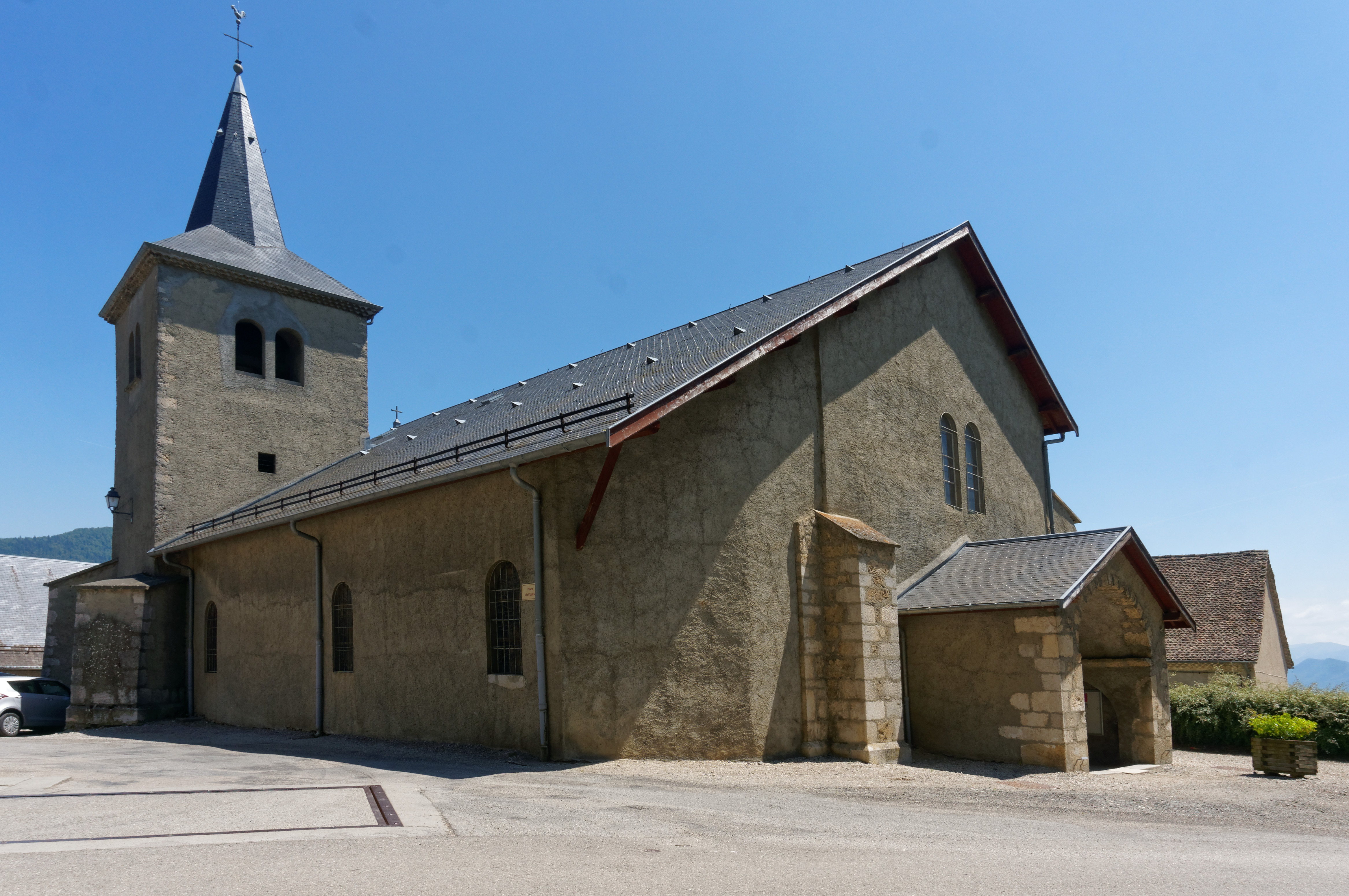 L'église de Sinard